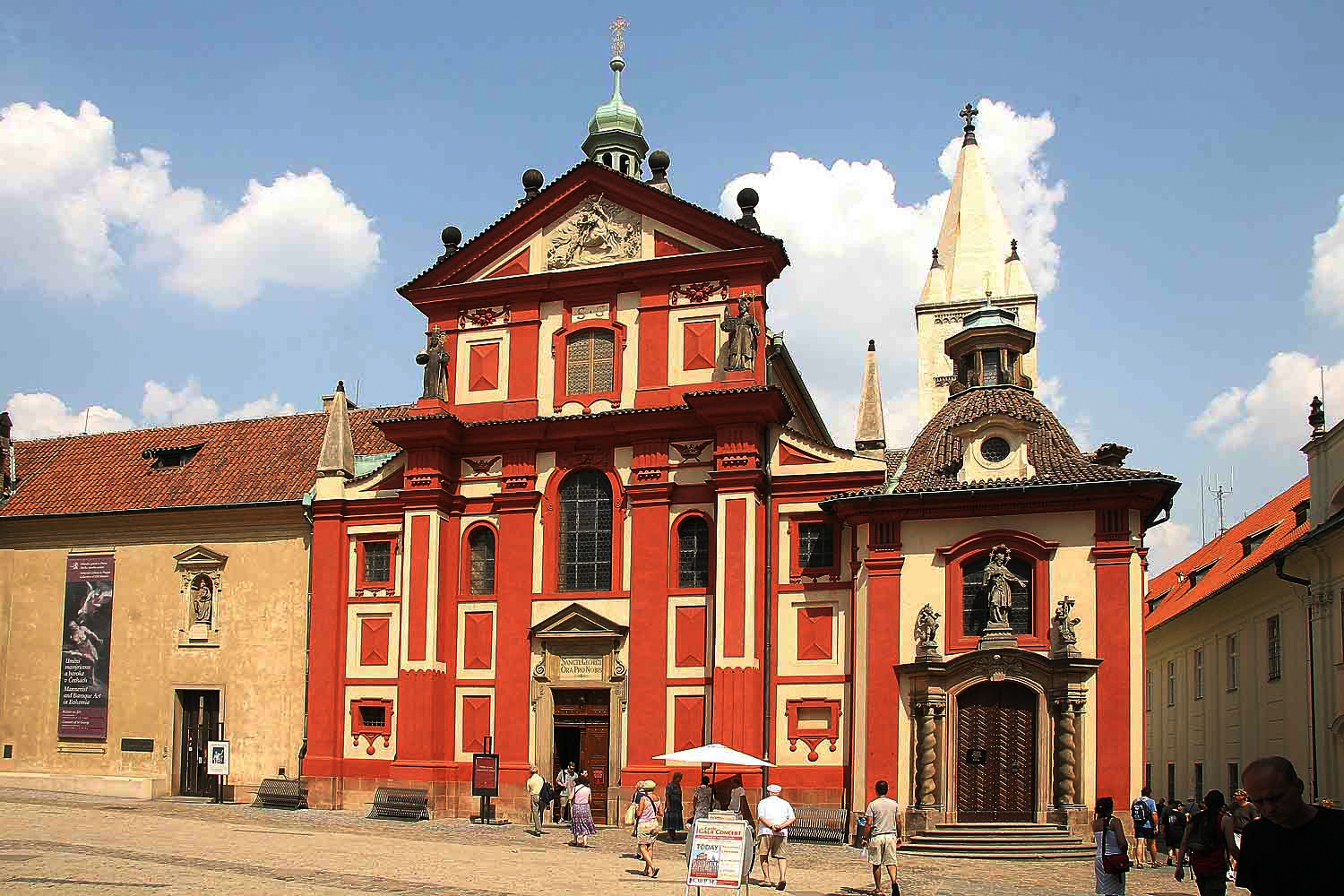 Basilika Saint George, Praha